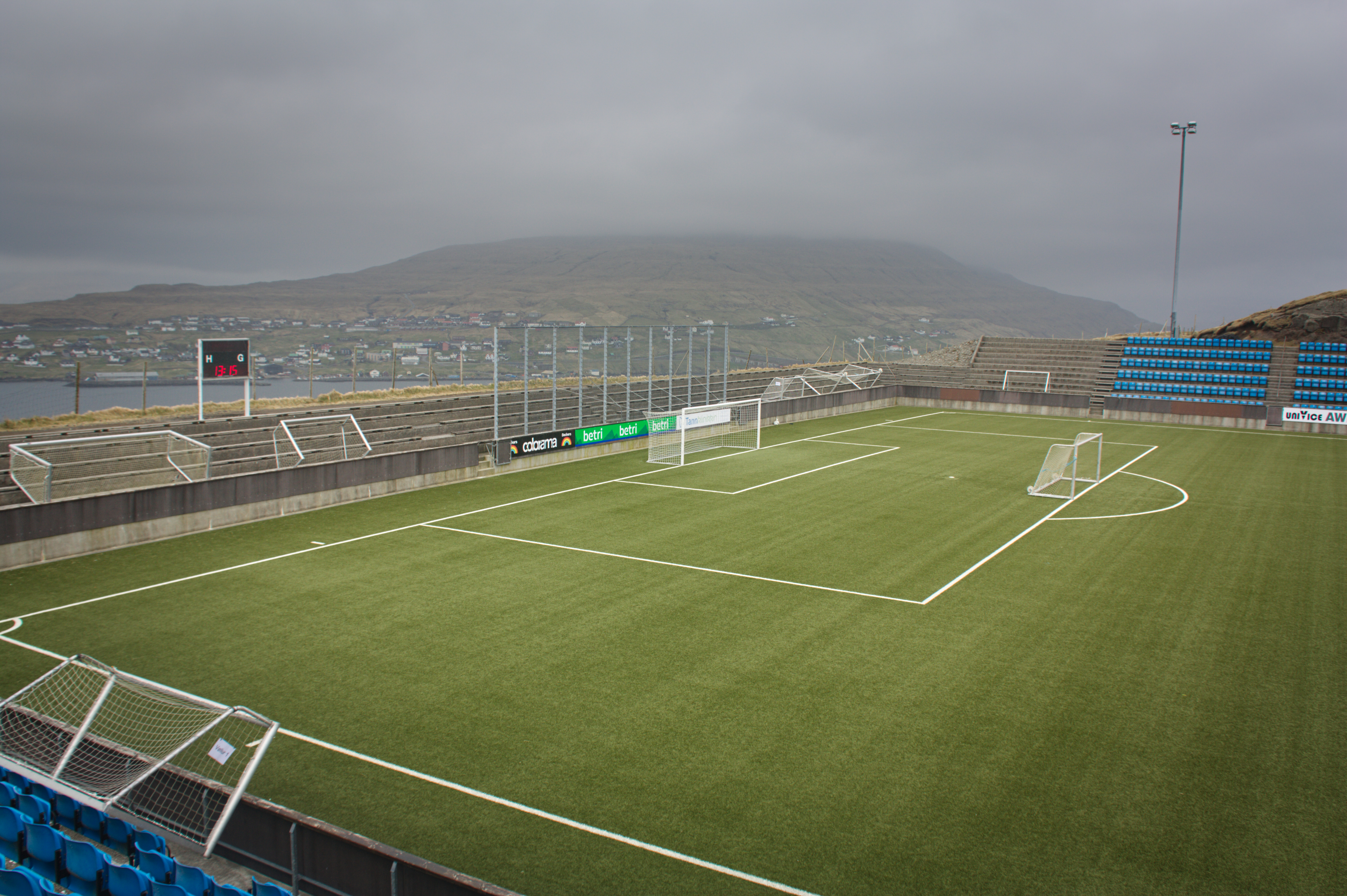 Do roku 2000 największy stadion na archipelagu, mogący pomieścić ponad 7 000 ludzi. Swoje mecze rozgrywała tu niegdyś farerska reprezentacja.